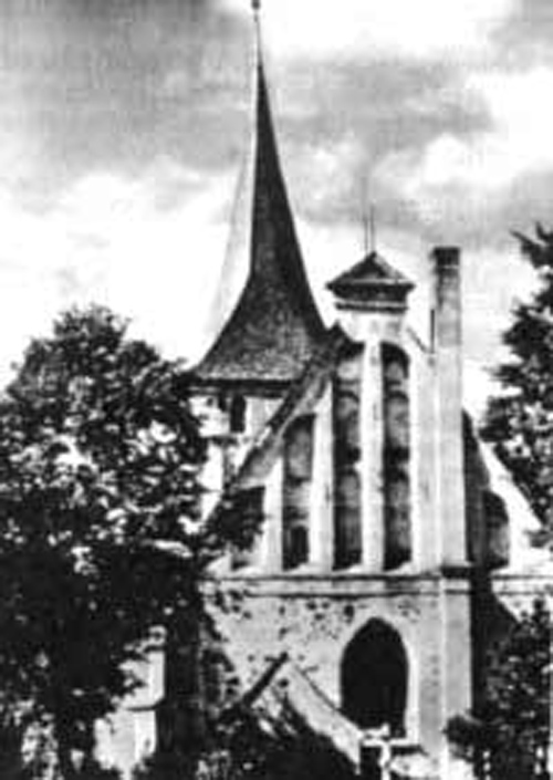 Кирха в Кведнау (нем. Quednaukirche) — кирха в Кведнау (нем. Quednau, районе Кёнигсберга (сейчас — район Северной Горы в Калининграде). Основана в 1268. Здание кирхи снесено в 1970-е годы.